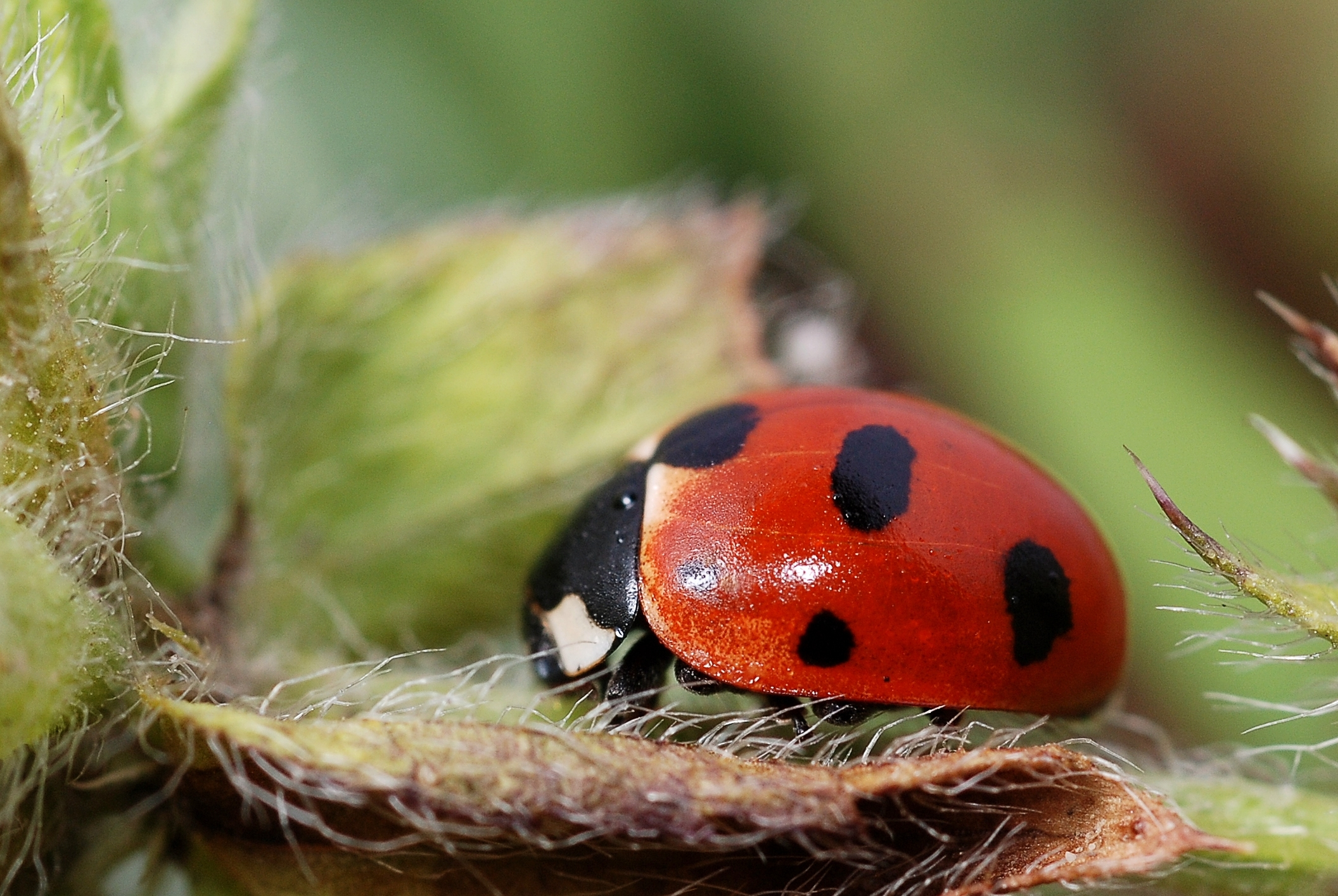 Coccinella magnifica, Parc naturel de la Vanoise, France